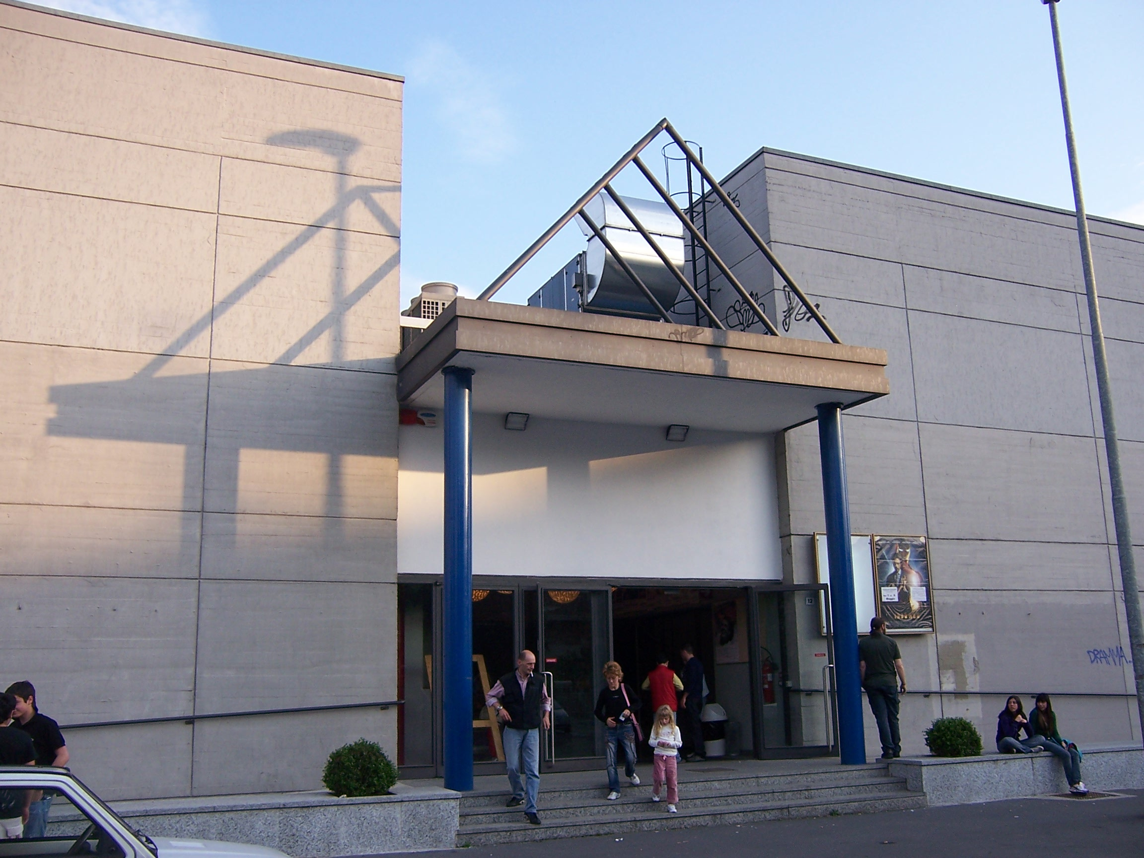 auditorium di Settimo Milanese in cui è presente il cinema, ristrutturato nel 2006